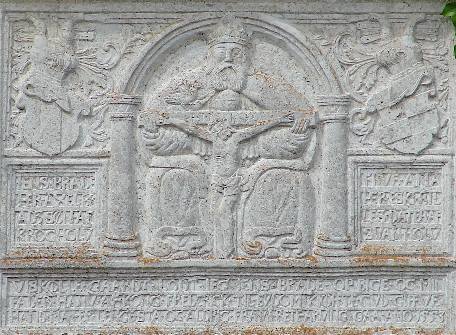 Relief fra Vittskövle, Vitskøl, Hvidskøvle slot, Brahe snaphaner, Skåne, Scania